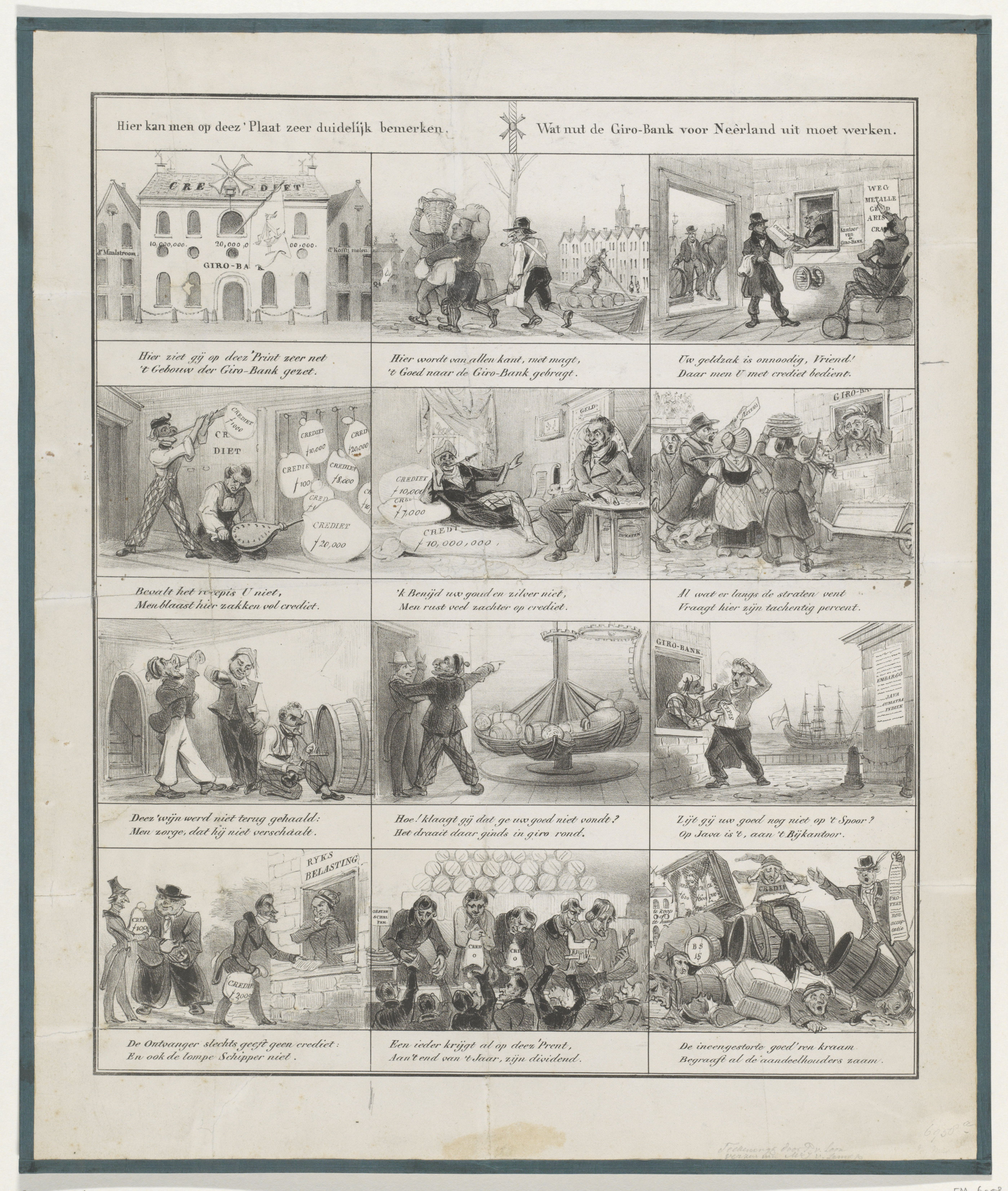 IdentificatieTitel(s): Spotprent op de plannen tot de oprichting van een Girobank, 1836Hier kan men op deez' Plaat zeer duidelijk bemerken, Wat nut de Giro-Bank voor Neêrland uit moet werken (titel op object)Objecttype: prent spotprent Objectnummer: RP-P-OB-88.602Catalogusreferentie: FMH 6958-aAtlas van Stolk 7289Opschriften / Merken: verzamelaarsmerk, verso, gestempeld: Lugt 2228Omschrijving: Spotprent op de plannen van Santhagens, Bake en Brugmans tot de oprichting van een Algemene Handelsbank (Girobank, Kredietbank of Wisselbank) te Amsterdam, januari 1836. Blad in de vorm van een centsprent met twaalf kleine voorstellingen Waar: in allerlei transacties op krediet belachelijk worden gemaakt. Onder elke scène een tweeregelig versje.VervaardigingVervaardiger: naar tekening van: Pieter van Loonschrijver: Jacob van LennepPlaats vervaardiging: NederlandDatering: 1836Fysieke kenmerken: lithografie op papier gedoubleerd met linnenMateriaal: papier linnen Techniek: lithografie (techniek)Afmetingen: blad: h 500 mm × b 420 mmOnderwerpWat: girobankcreditWanneer: 1836-01 - 1836-01Verwerving en rechtenVerwerving: aankoop 1881Copyright: Publiek domein